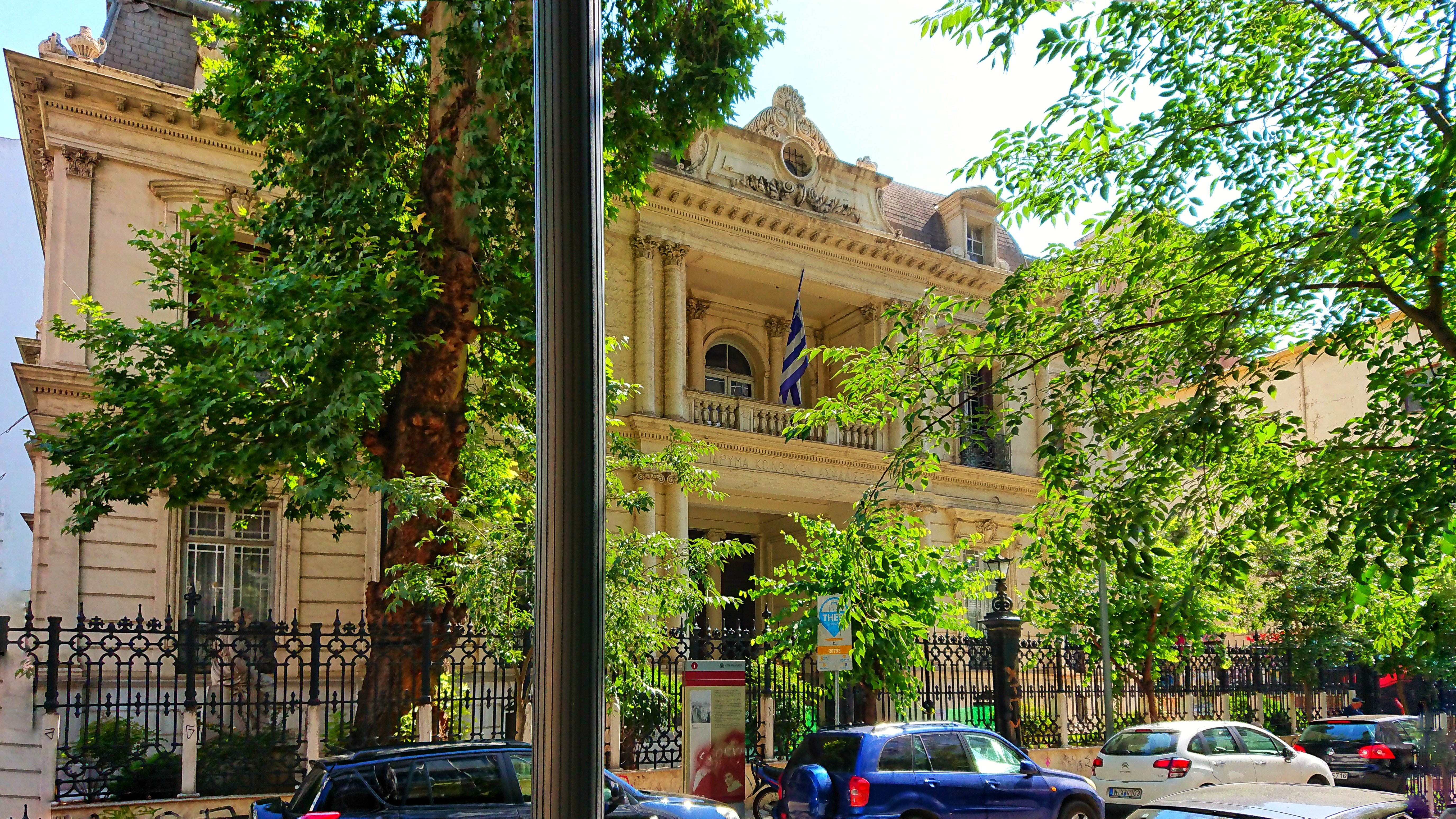 Κρατικό Ωδείο Θεσσαλονίκης (πρώην Οθωμανική Τράπεζα)«Κρατικό Ωδείο Θεσσαλονίκης (πρώην Οθωμανική Τράπεζα)»